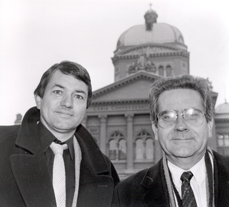 Norbert Hochreutener und Hansjörg Erny, Schweizer TV-Journalisten und Autoren